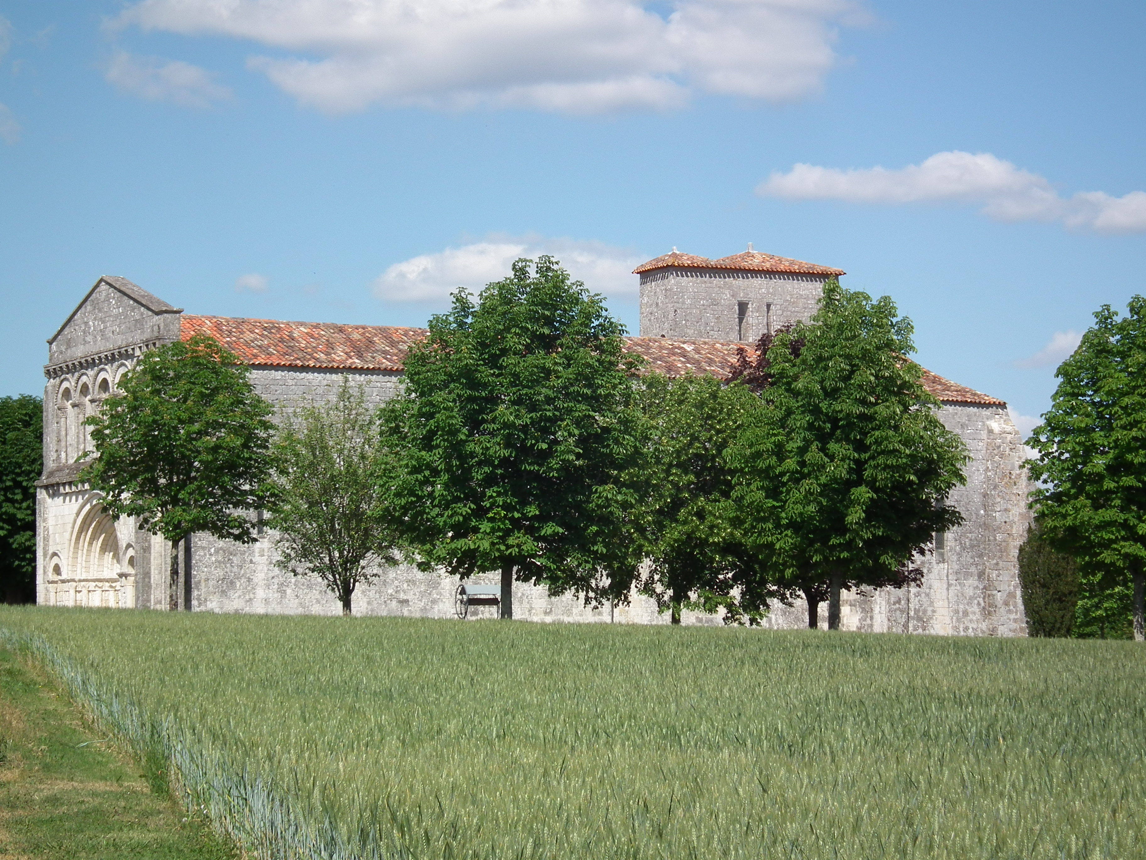 L'église de Saint-Léger (Charente-Maritime)